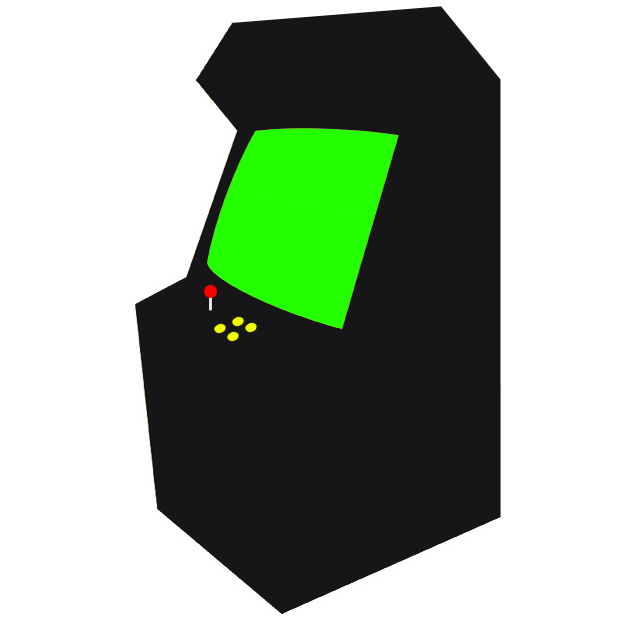 Icon of an arcade machine